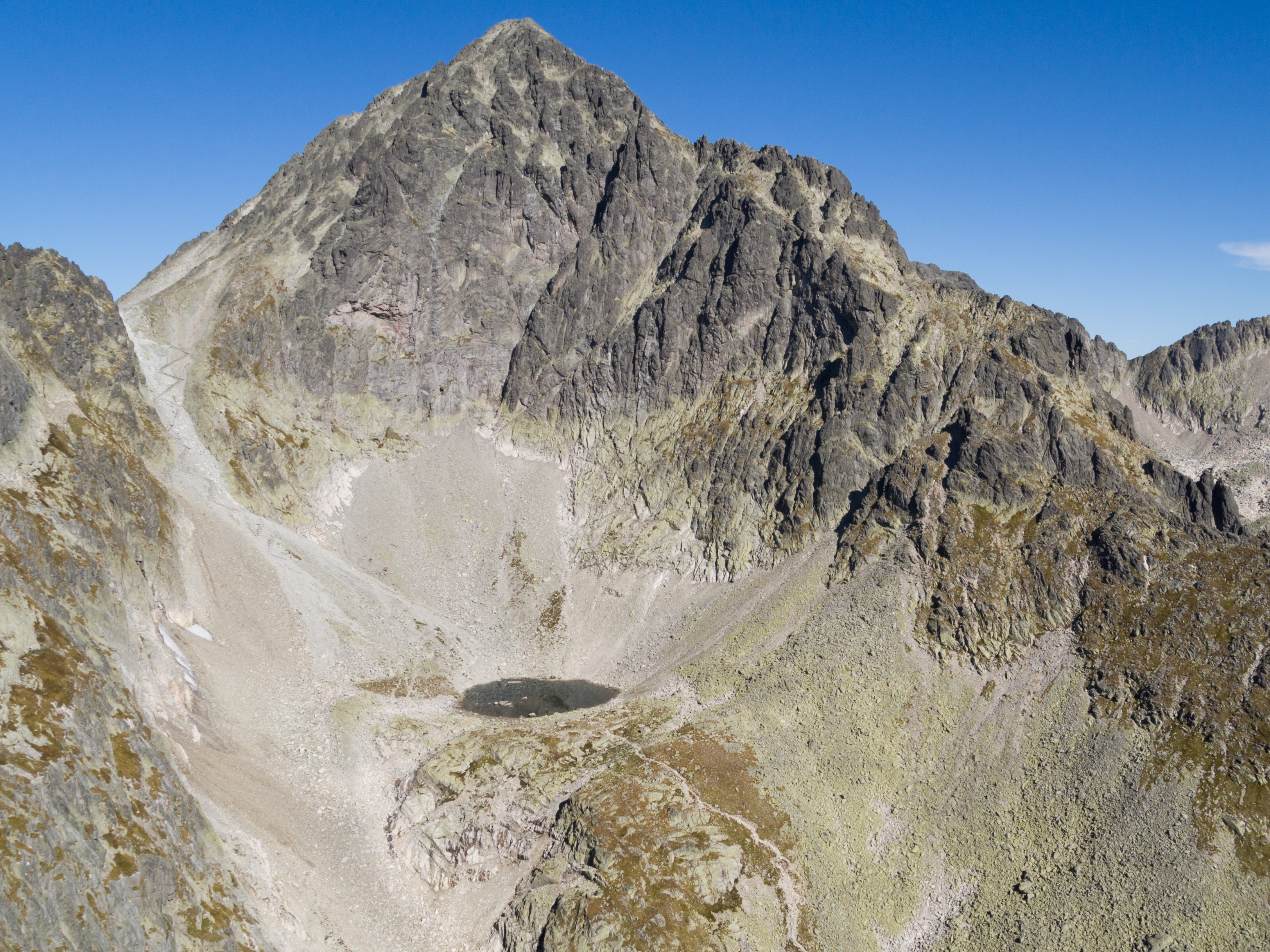 Lodowa Kopa nad Lodowym Stawkiem, po lewej Lodowa Przełęcz.